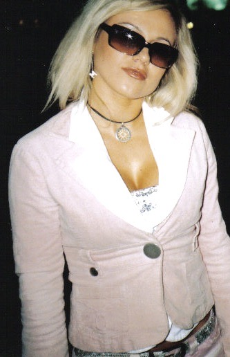 Doda w 2006